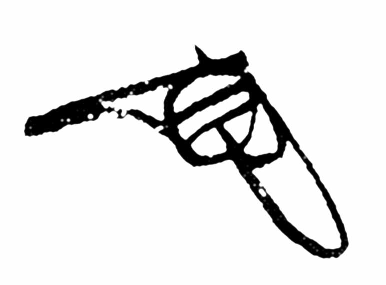 太田道灌 Outa Doukan Signature.